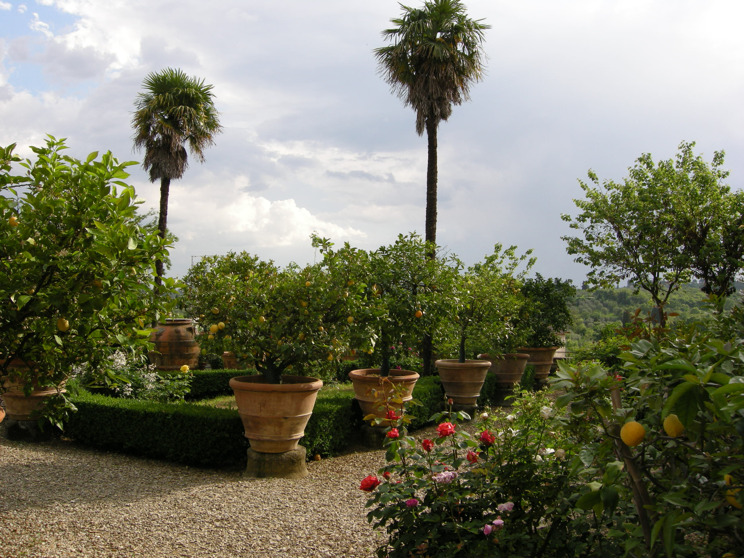 Villa il riposo, giardino